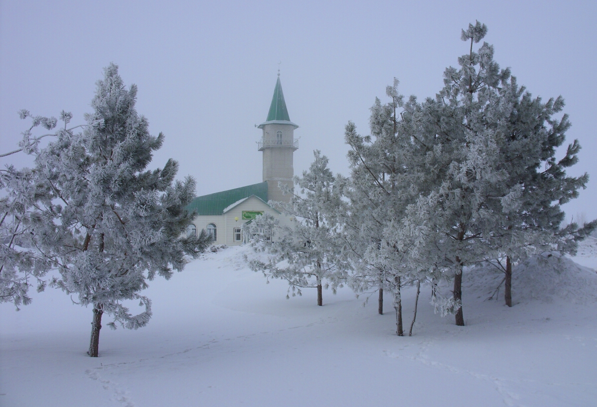 В мечети довольно просторный зал для молитв, где пол выложен ковролином, комната для омовений, небольшая лавка с религиозной литературой. Есть и свой магазин.